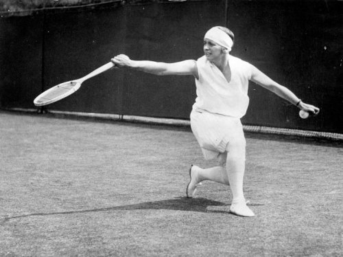 Kea Bouman (1903-1998), Nederlands tennisster, tijdens een tennistoernooi op Wimbledon. Londen, Engeland, 26 juni 1929.